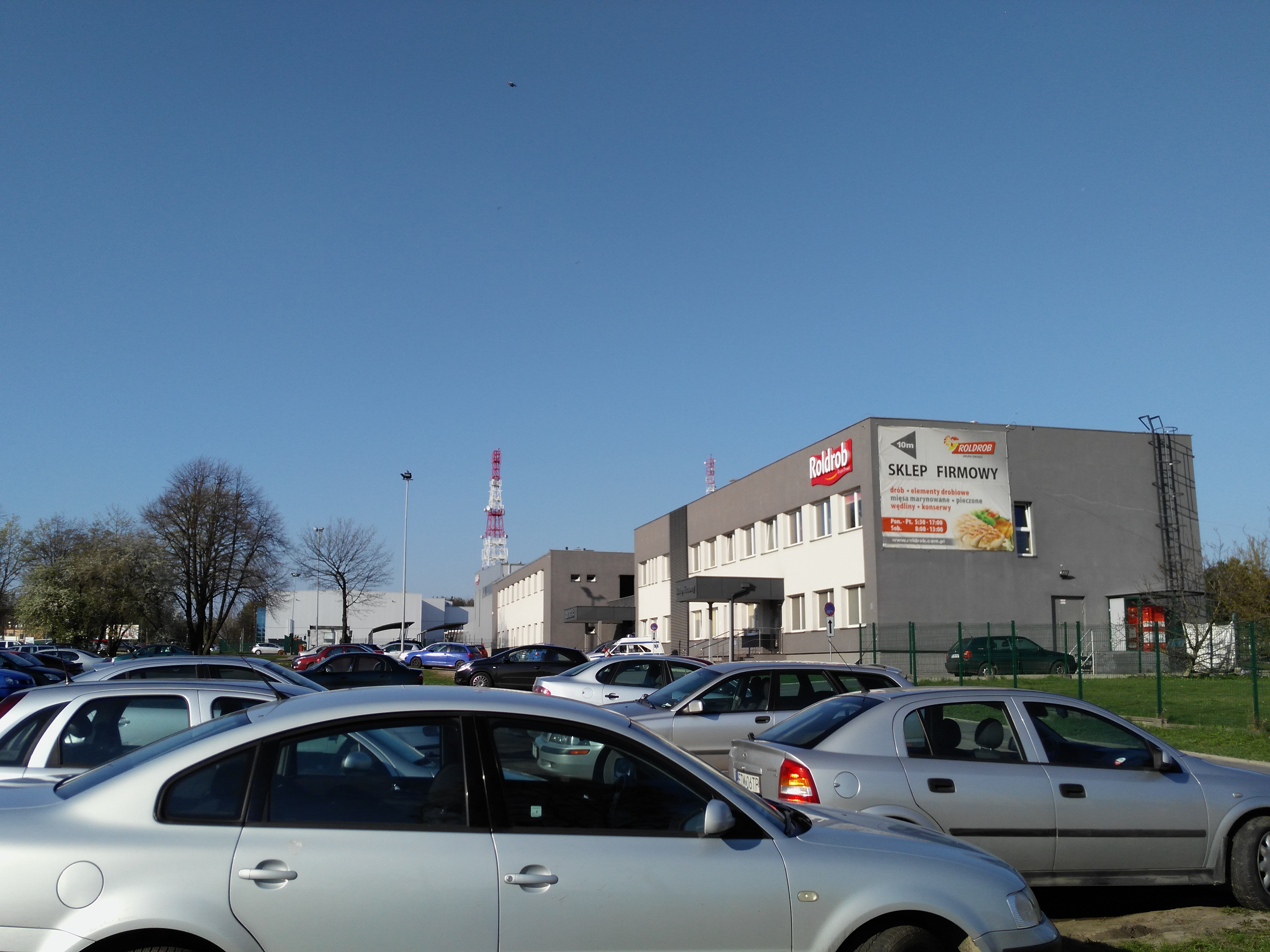 Tomaszowskie zakłady drobiarskie RolDrób należace do notowanego na GPW Drosedu